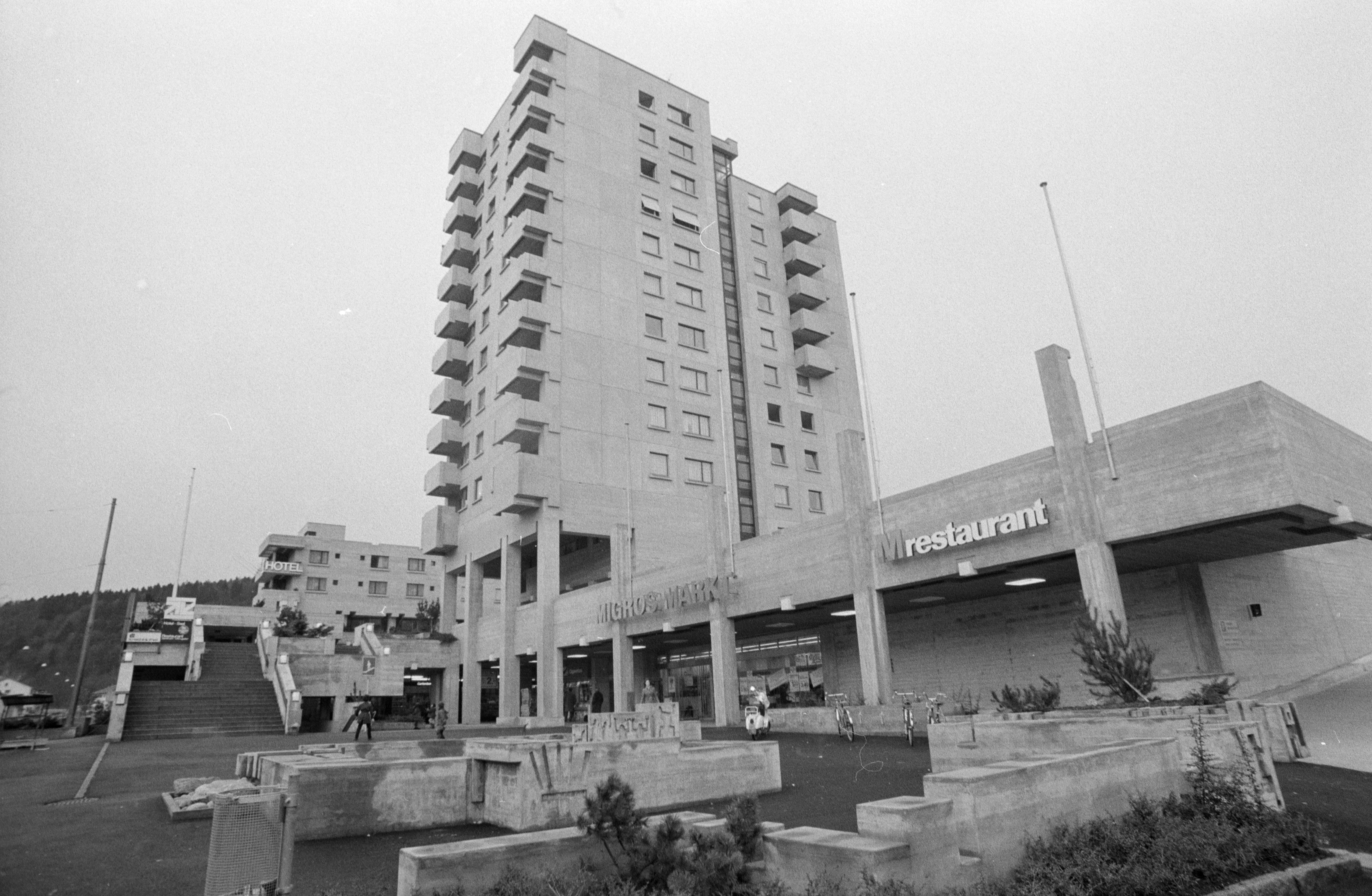 Zentrum Töss, Winterthur, Schweiz kurz nach der Eröffnung